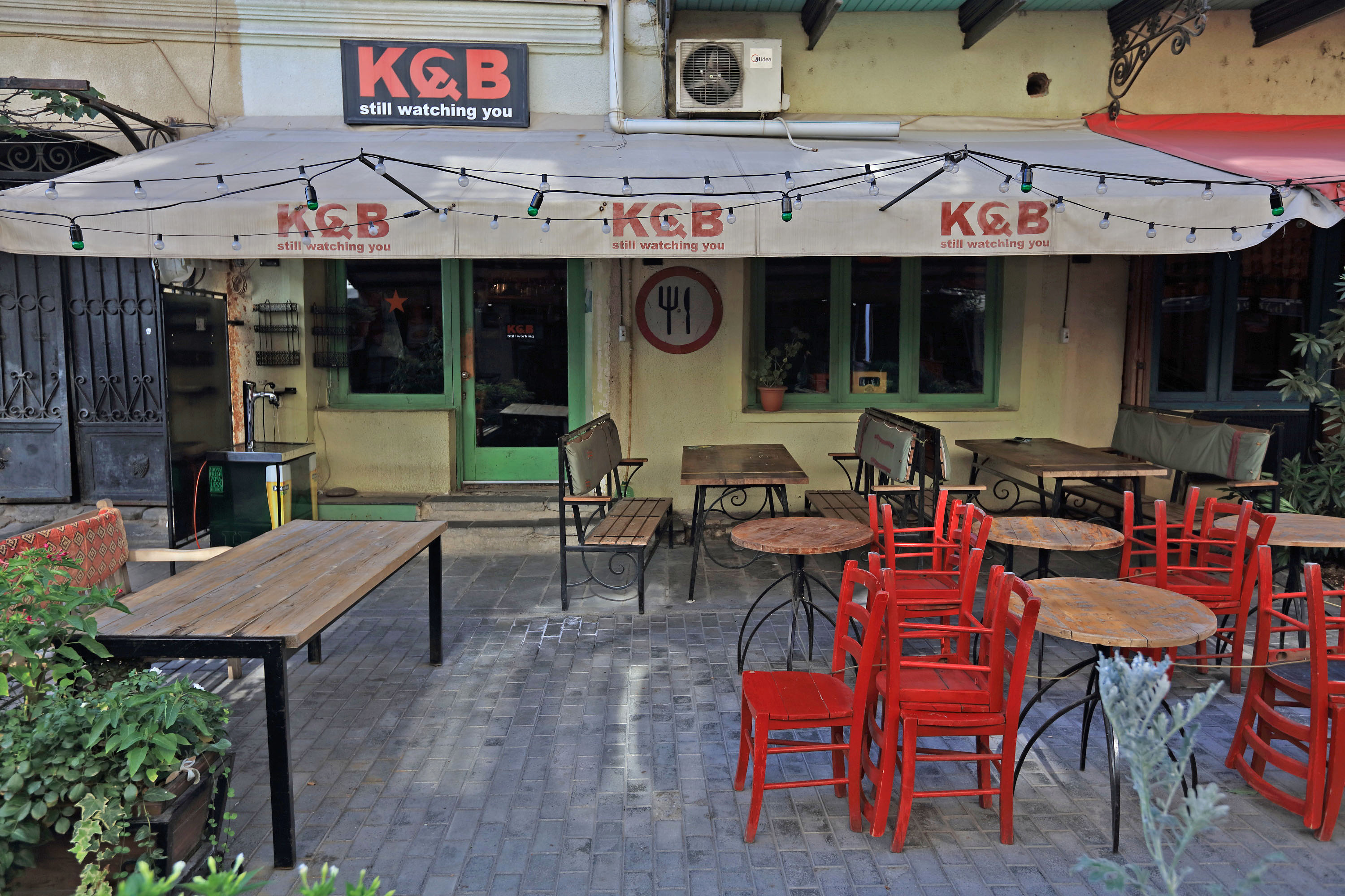 KGB v Tbilisi